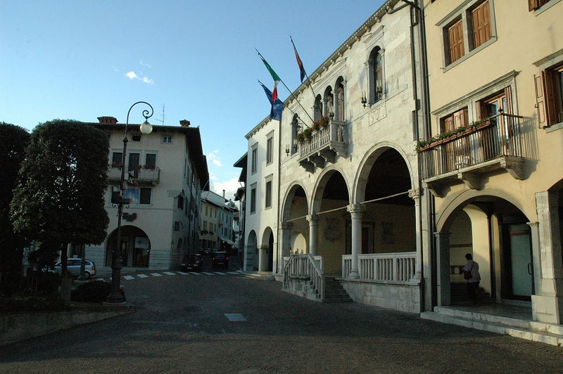 Gemona del Friuli, Palazzo Boton, sede del comune.